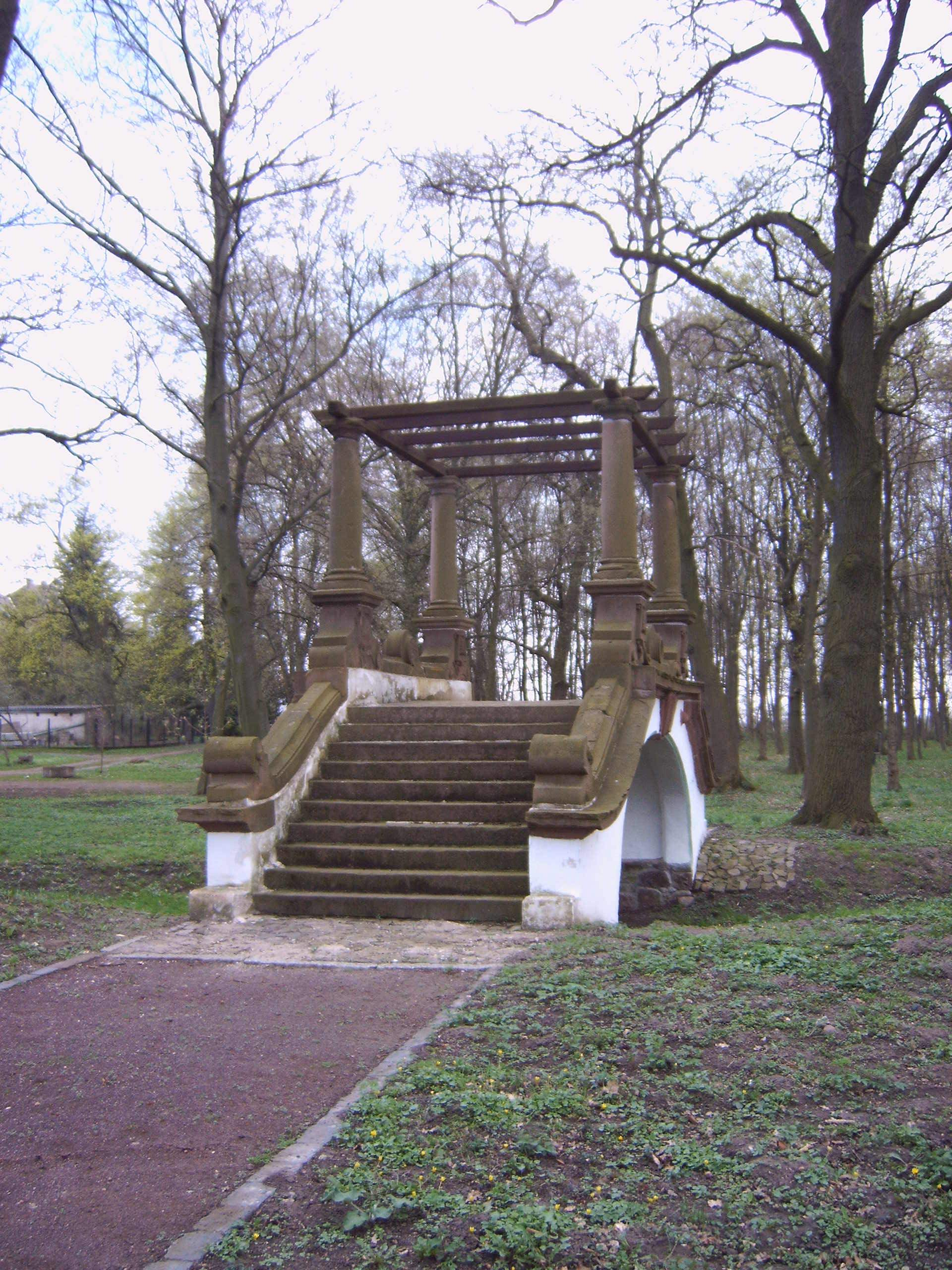 Dombrücke im Pöthener Park, Pöthen, Gommern, Deutschland Bild aufgenommen am 22.4.2006 durch Olaf Meister